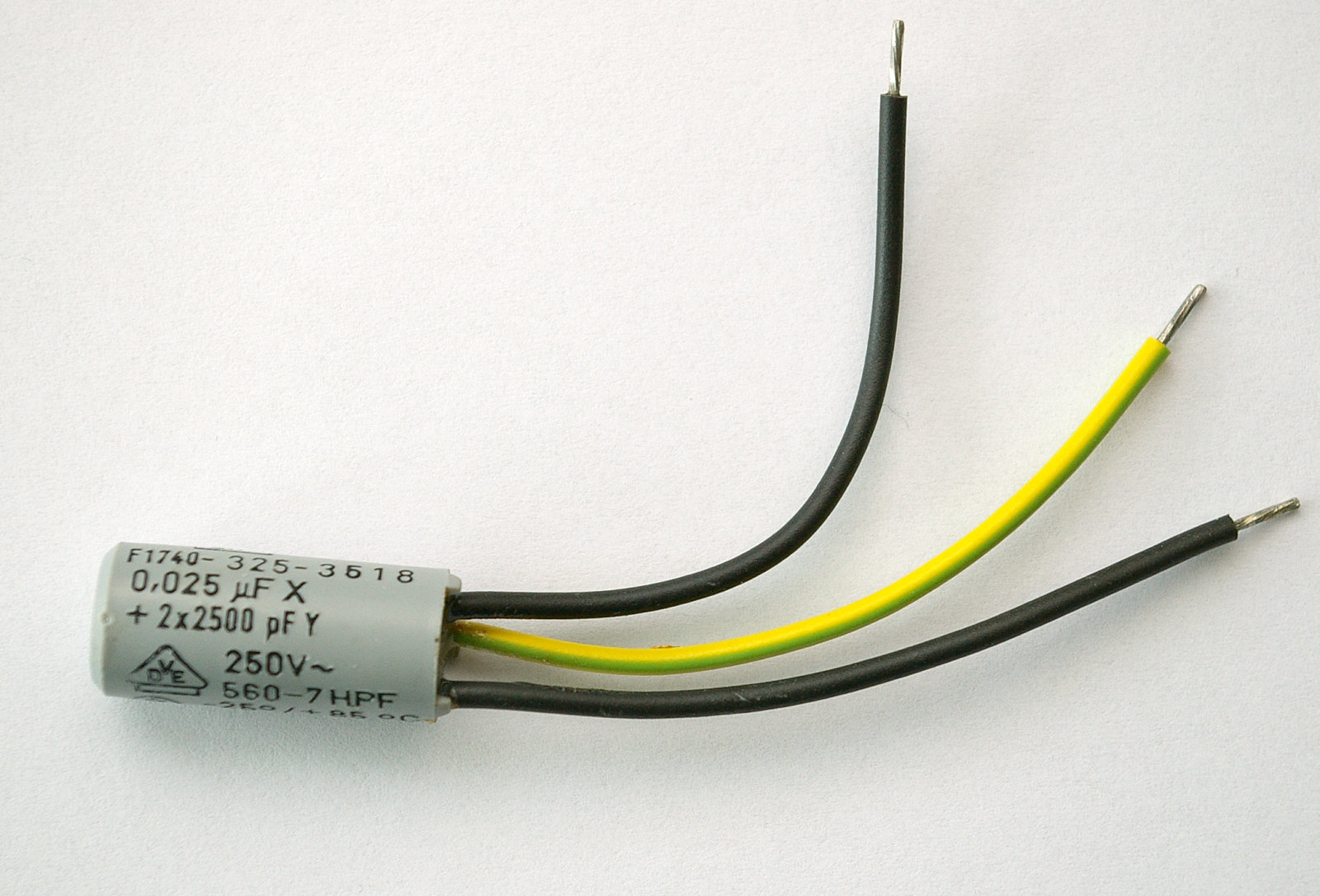 XY-Entstörkondensator, wie er in Haushaltsgeräten mit PE-Anschluss üblich ist.